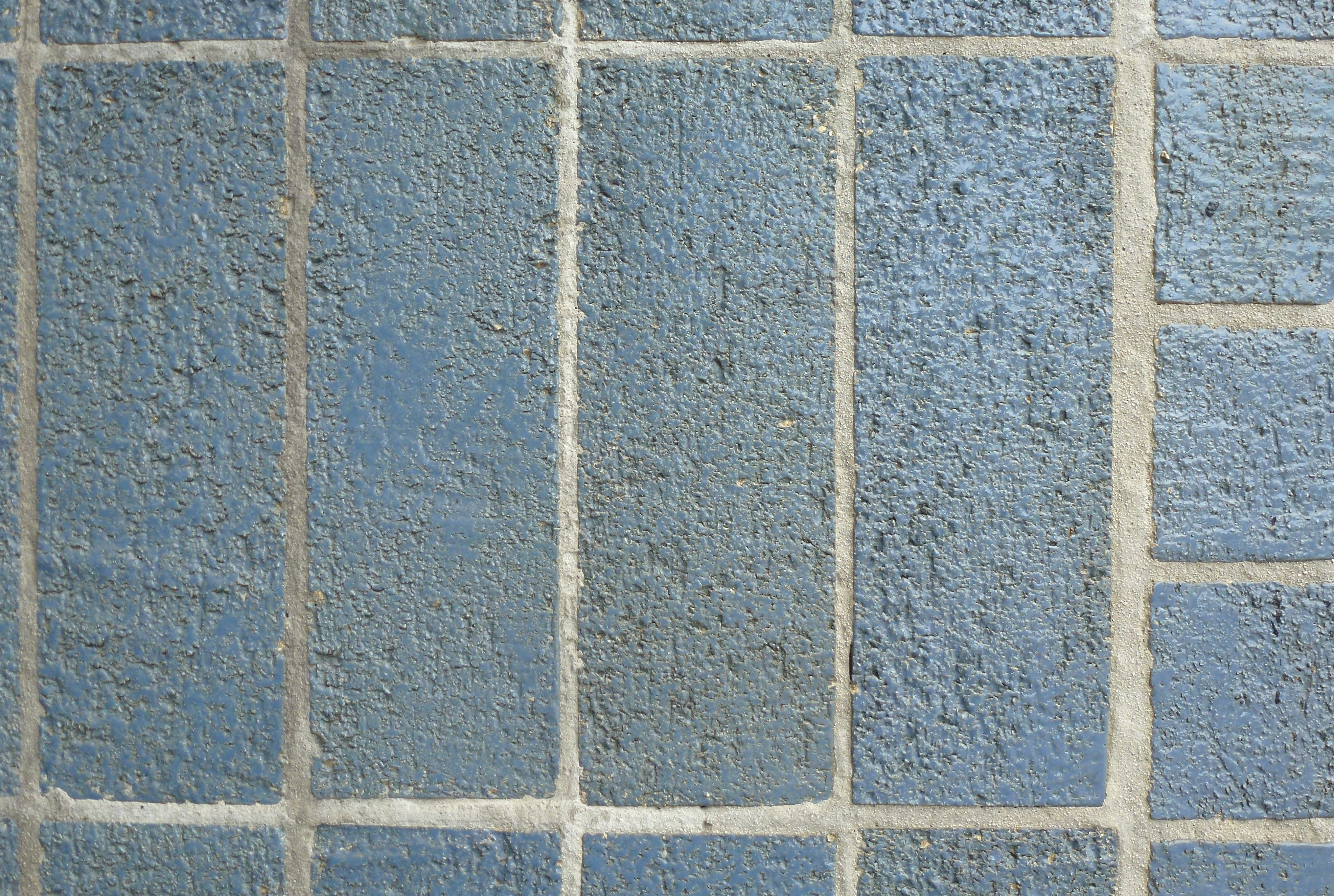 Dagens Nyheter byggnad, fasaddetalj